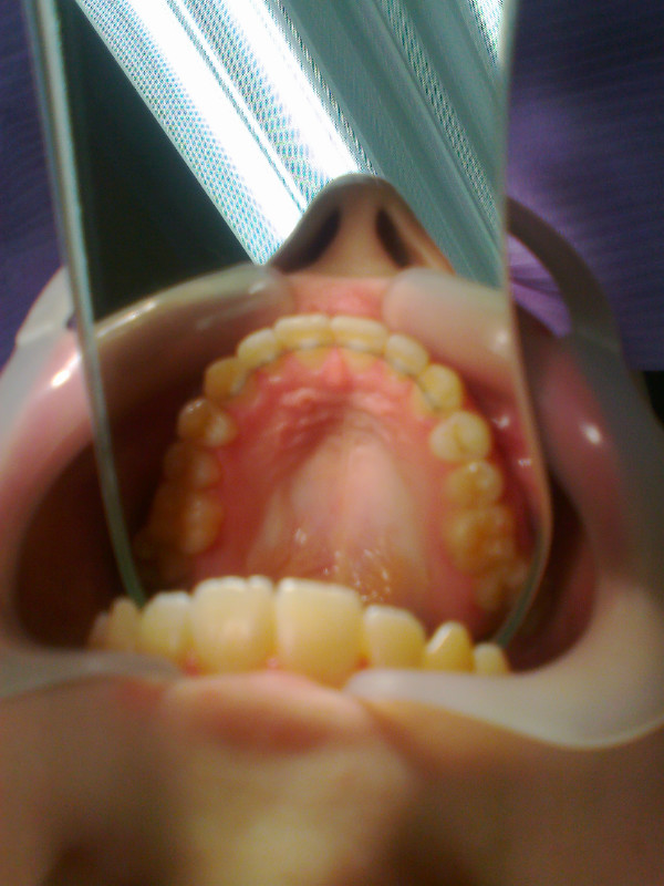 Несъёмный ретейнер на композитном, светоотверждаемом материале.